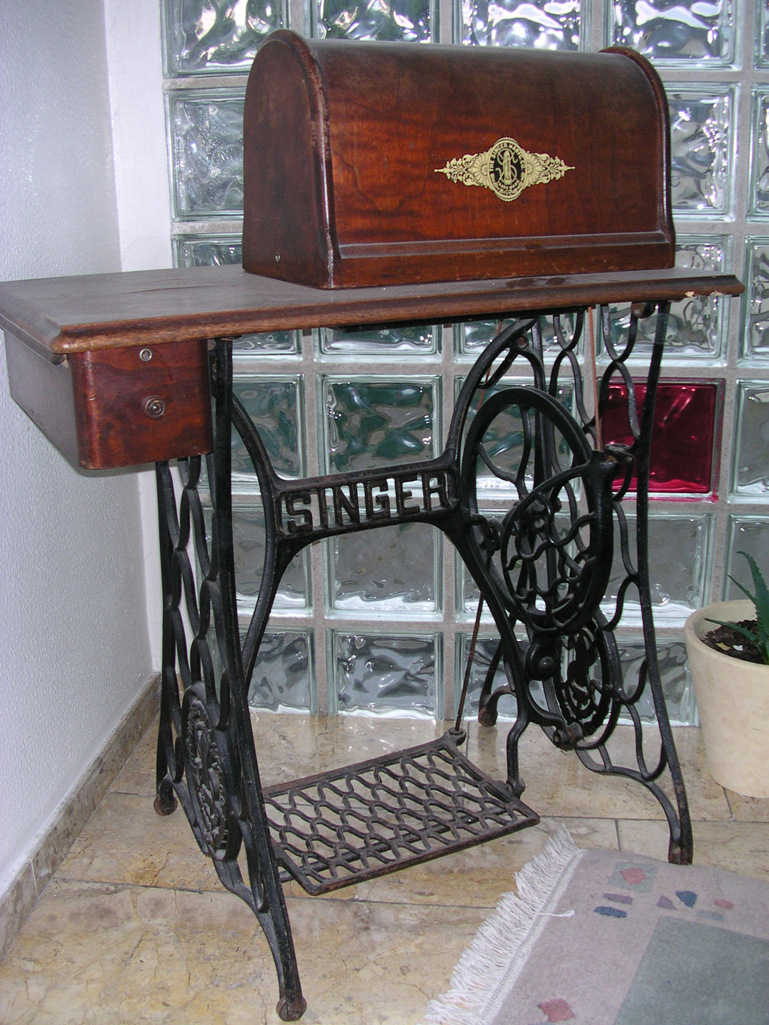 Singer Nähmaschine mit Tisch